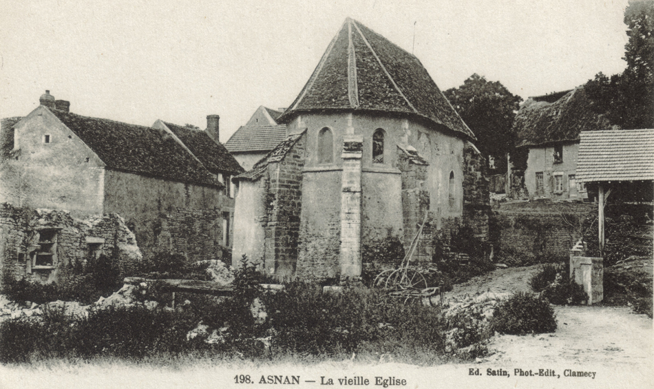 Le chevet de l'ancienne église d'Asnan. Carte postale éditée vers 1920.